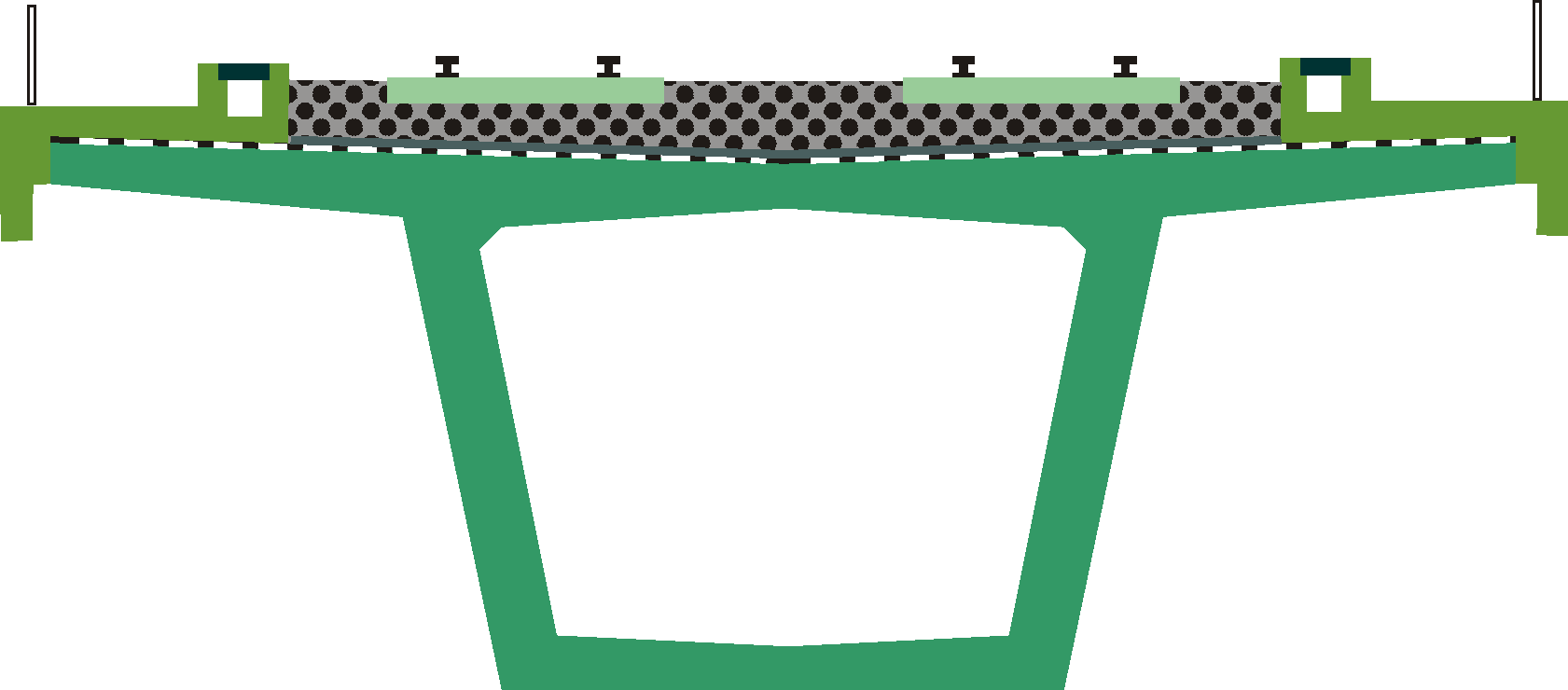 Querschnitt einer Spannbetoneisenbahnbücke mit Schotterbett in Deutschland